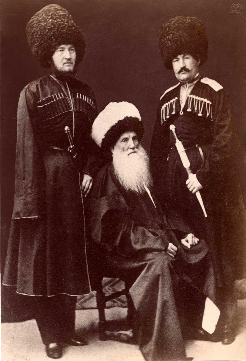 იმამი შამილი შვილებთან ერთად.